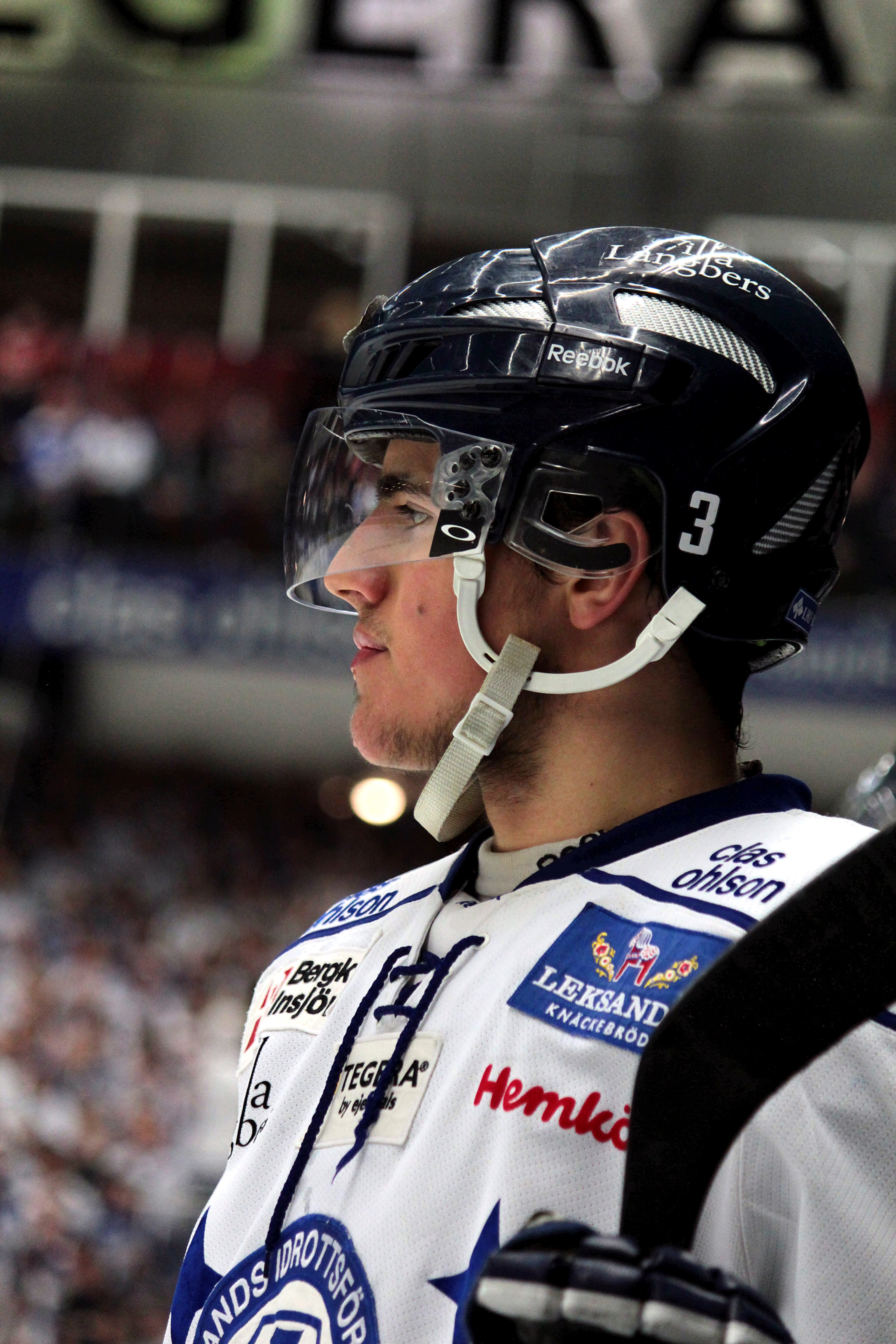 Alen Bibic i kvalmatchen mellan Leksands IF och Djurgårdens IF i Leksand 2012-03-31.